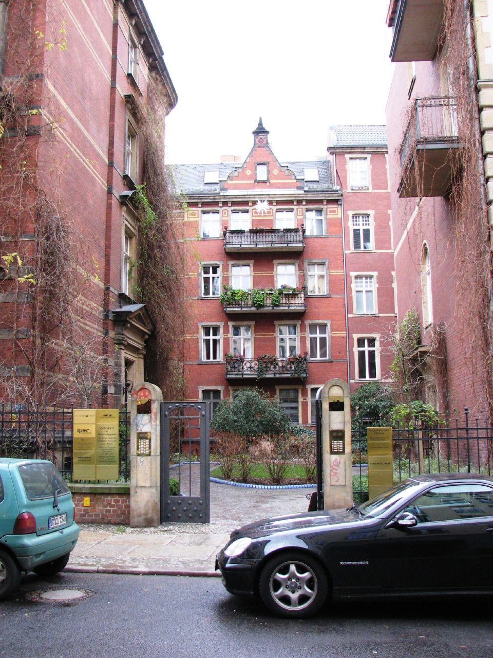 Lolas Wohnung aus "Lola rennt" in der Albrechtstraße Berlin